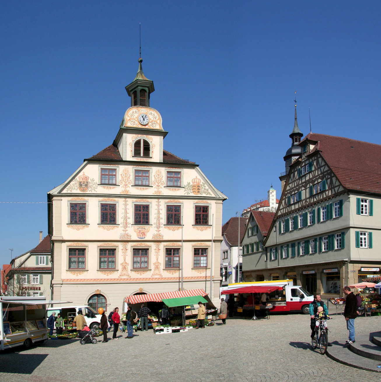 Rathaus von Vaihingen an der Enz. Das Bild wurde aus 2 Fotos zusammengesetzt.